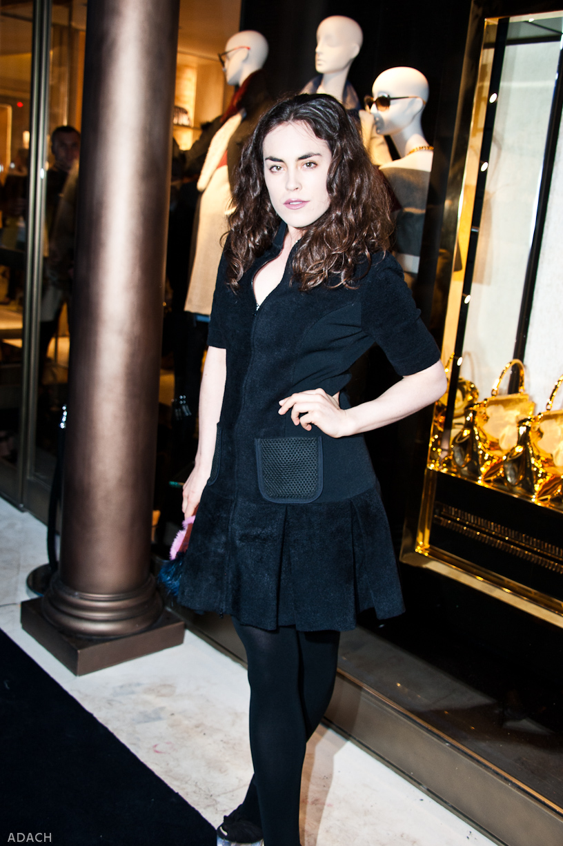 Fendi store opening - Tallulah Harlech